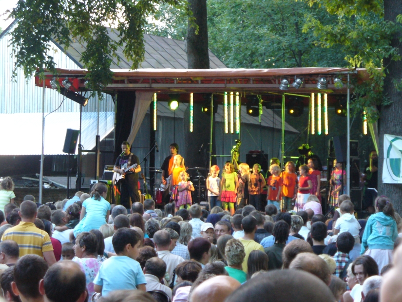 Besko 2010 - Arka Noego